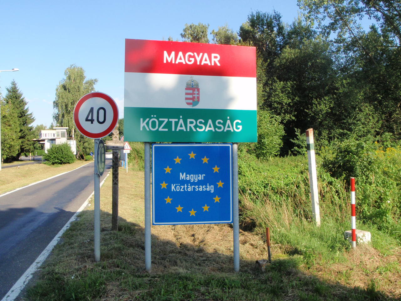 Grenzkorridor bei Güns